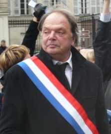 Jean-François Voguet, maire de Fontenay-sous-Bois et sénateur du Val-de-Marne